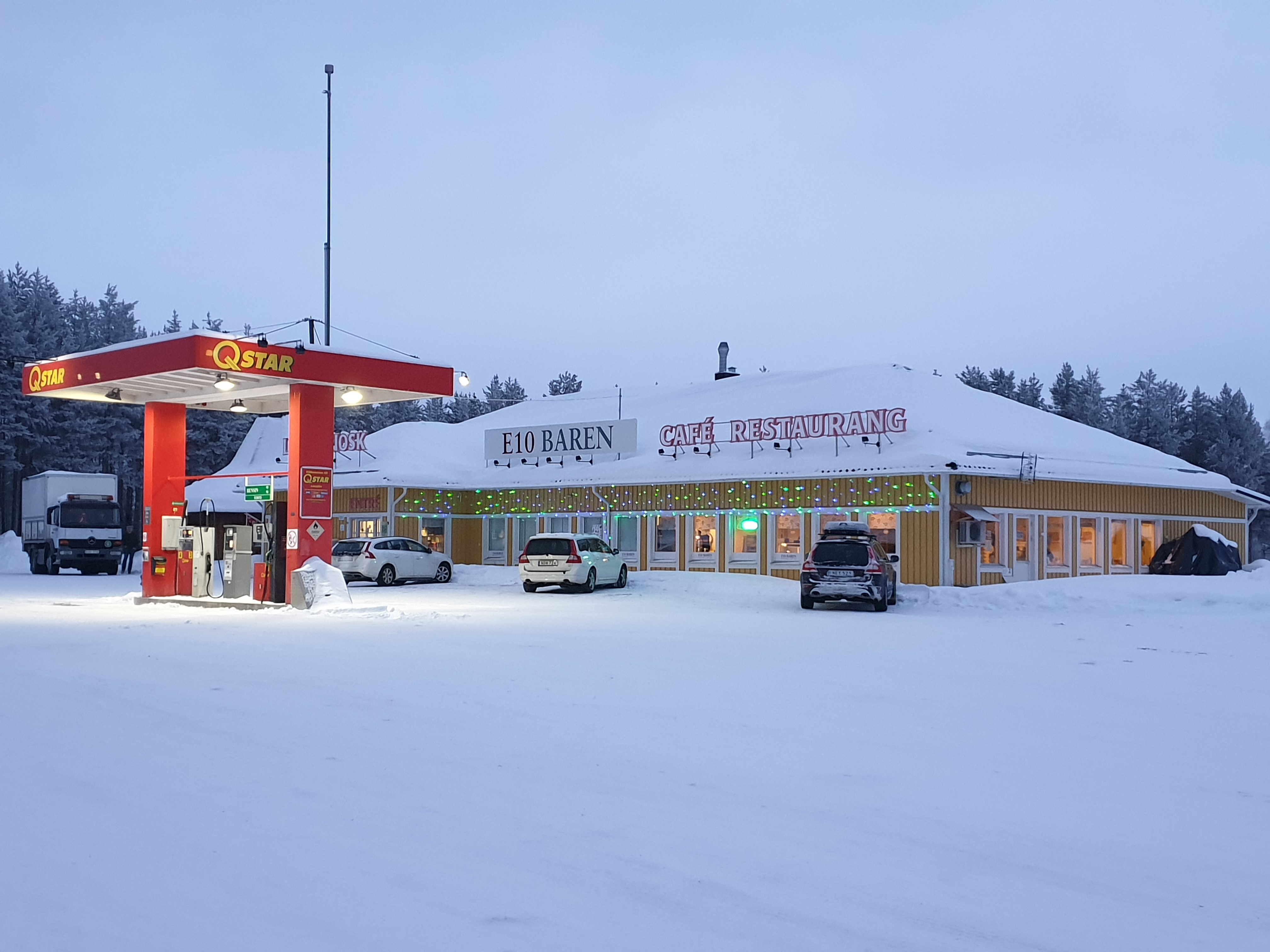 Vägkrog, kiosk, butik och bensinstation i Lansjärv